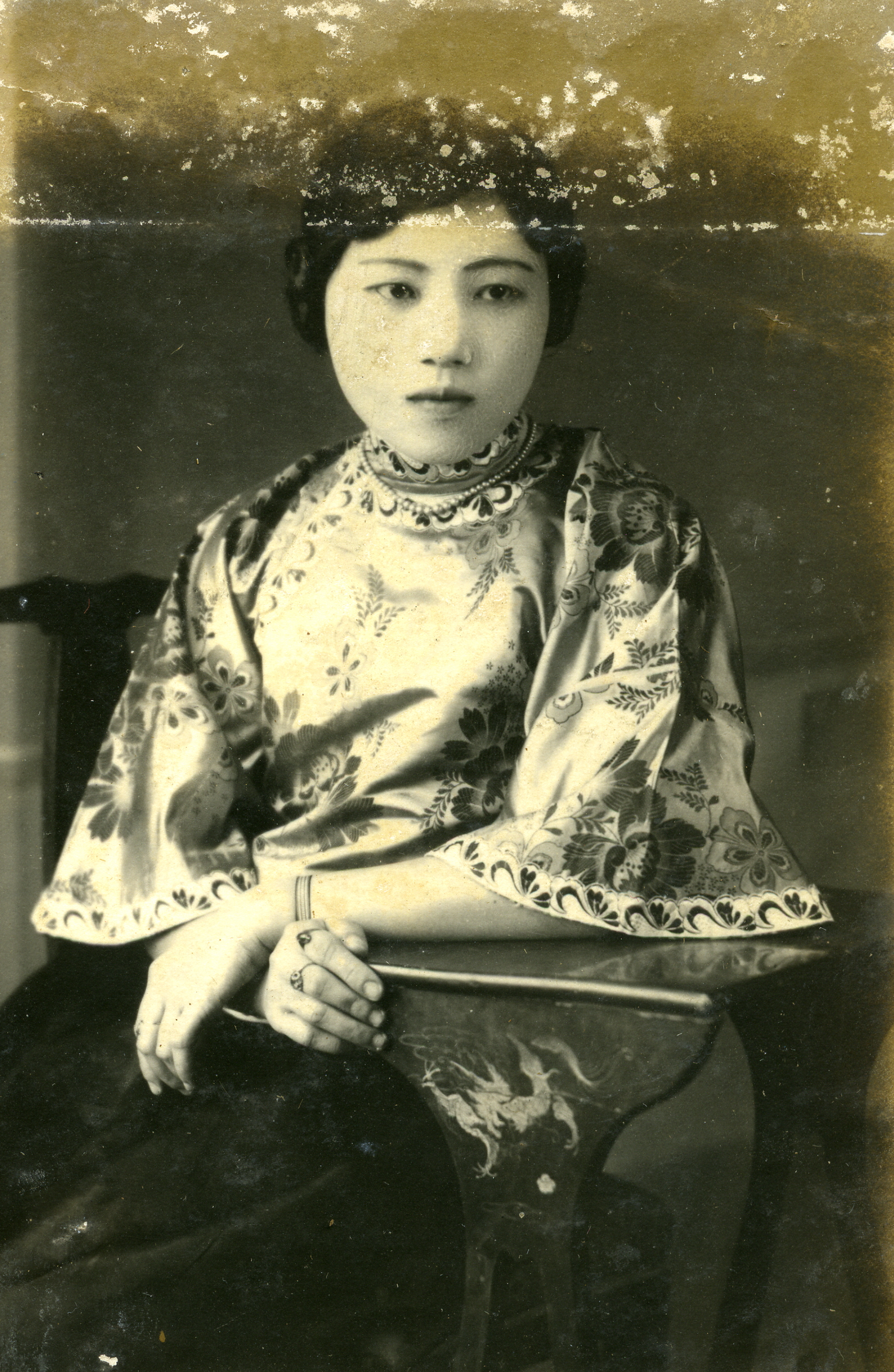 綢衫女子。